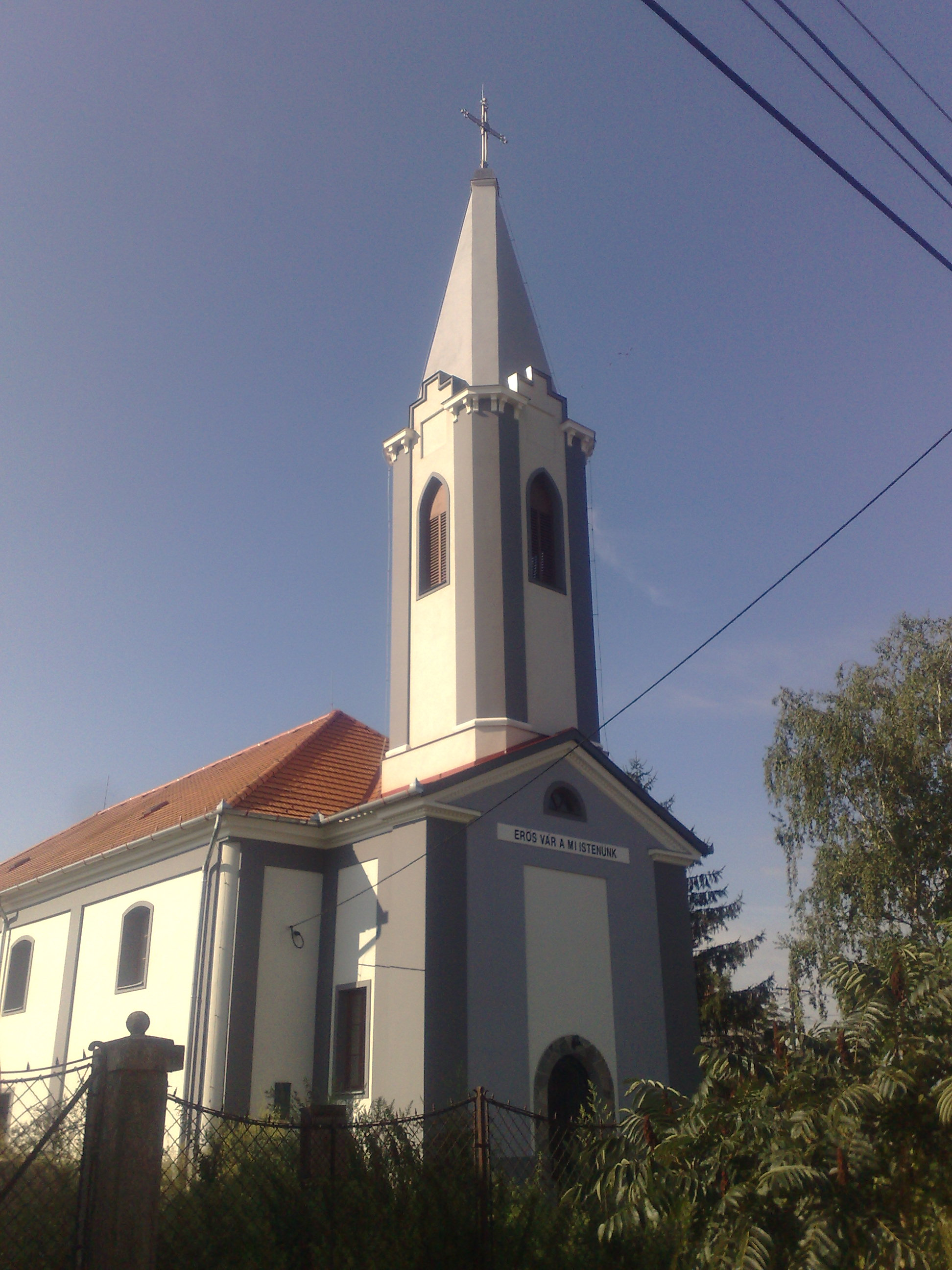 Győr-Moson-Sopron m., Szilsárkány, Lenin u. - evangélikus templom. klasszicista, 1810 körül.